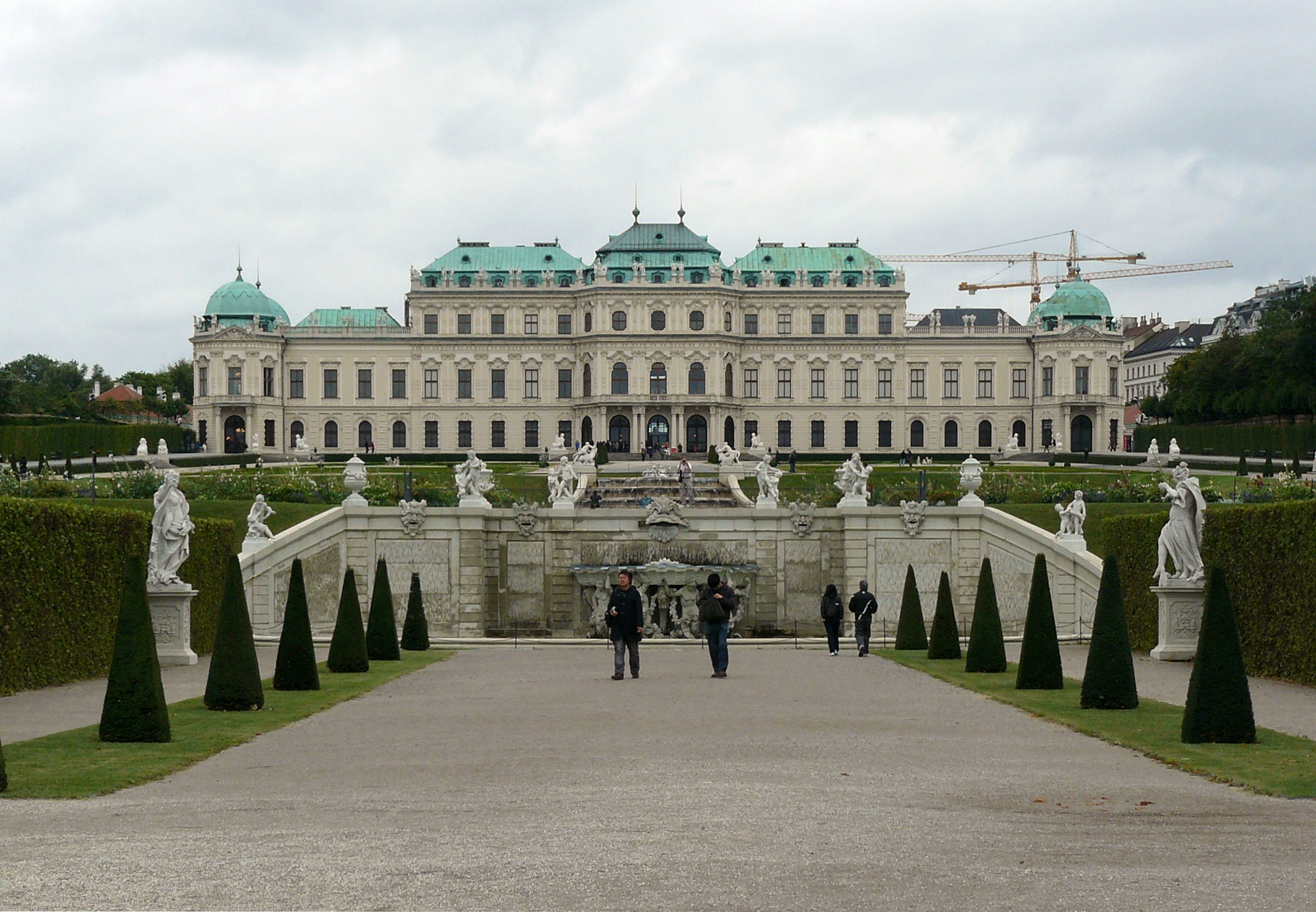 Schloss Belvedere in Wien